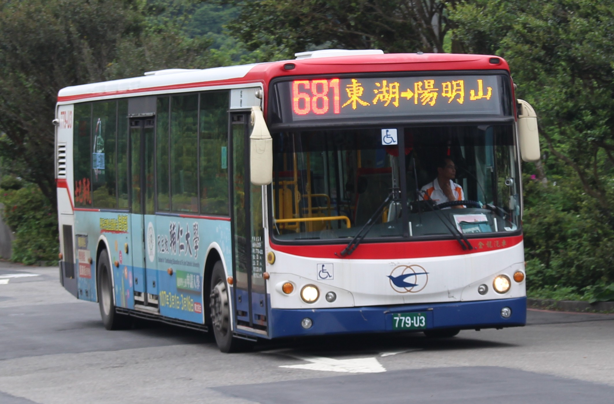 光華巴士2015 KINGLONG KL6120U1